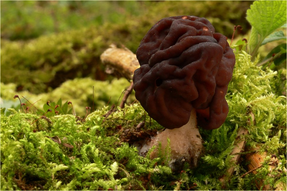 Giftlorchel (Gyromitra esculenta)